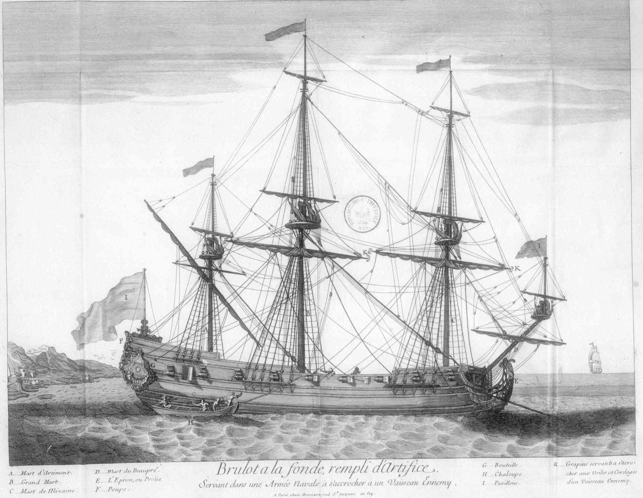 Fire ship